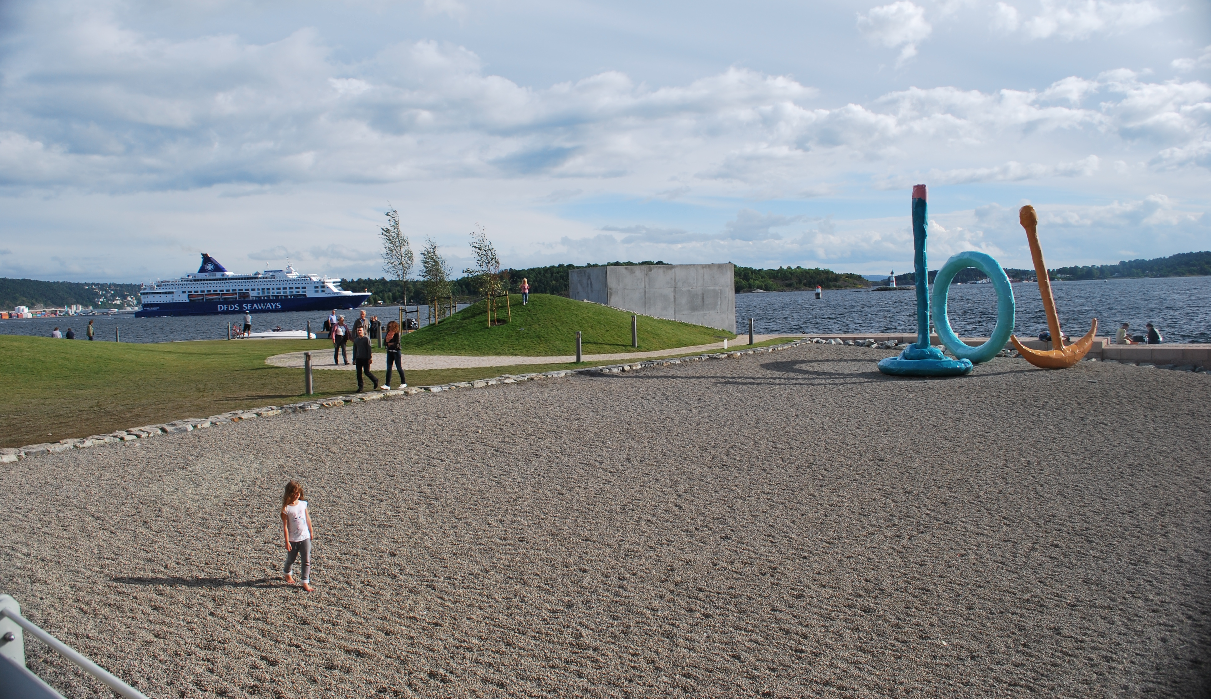 Skulpturparken på Skjæret, ytre del, Tjuvholmen, Oslo